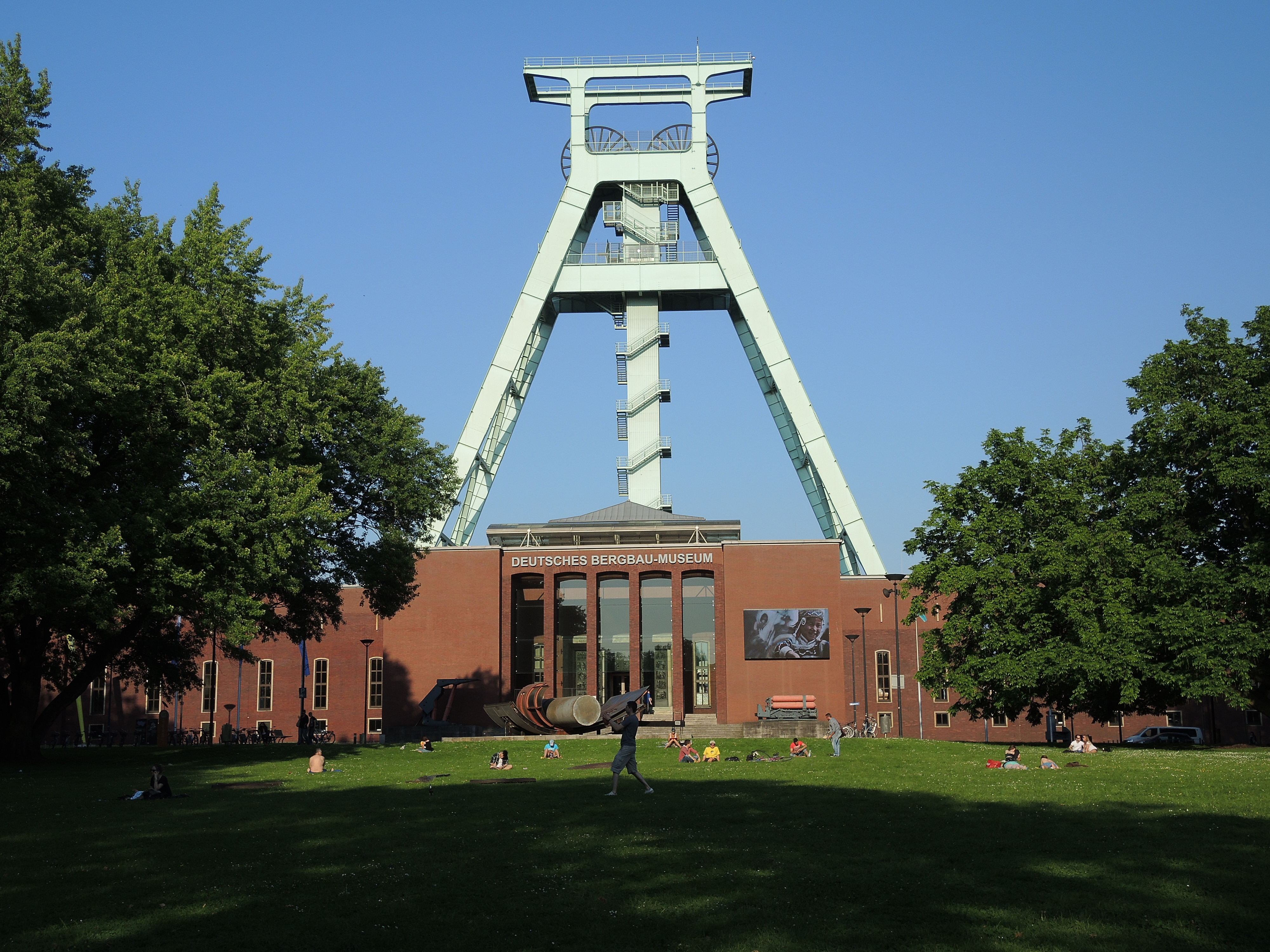 Das Bergbau-Museum Bochum 2013